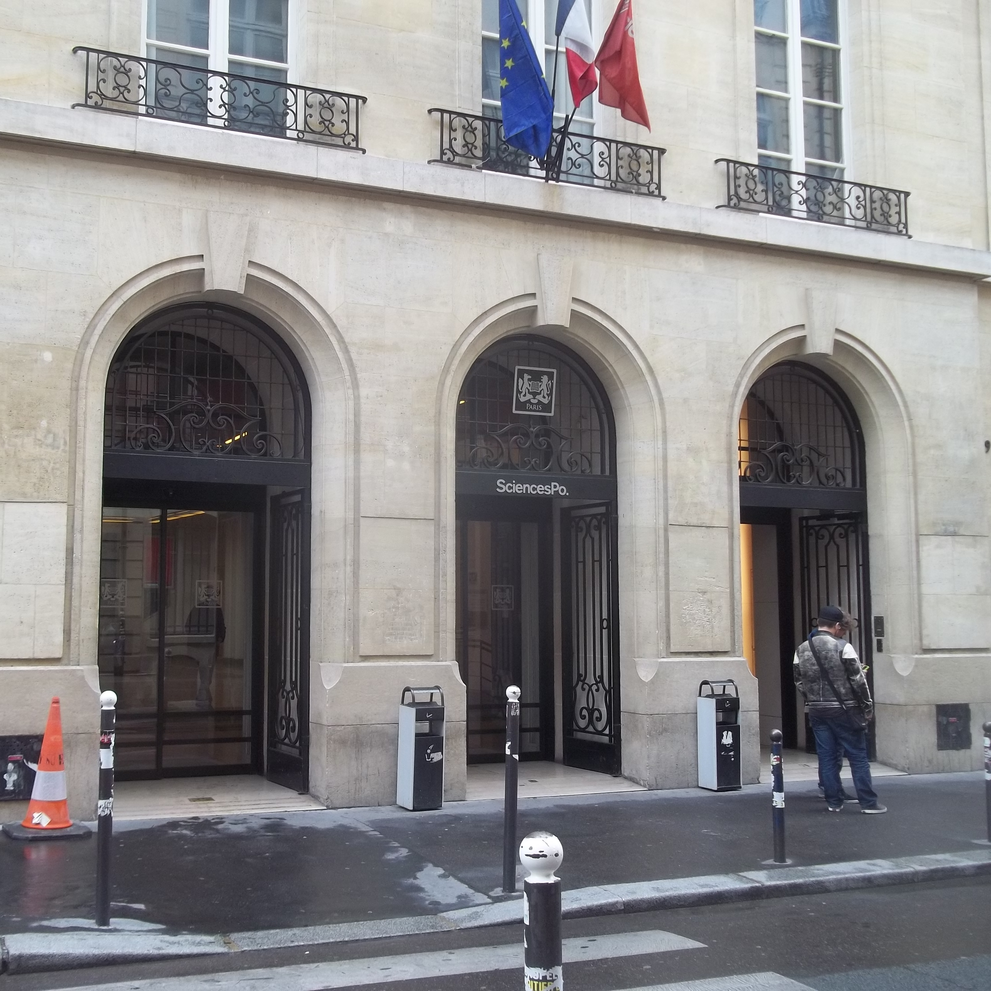 Entrée de SciencesPo Paris, au 27 rue St-Guillaume